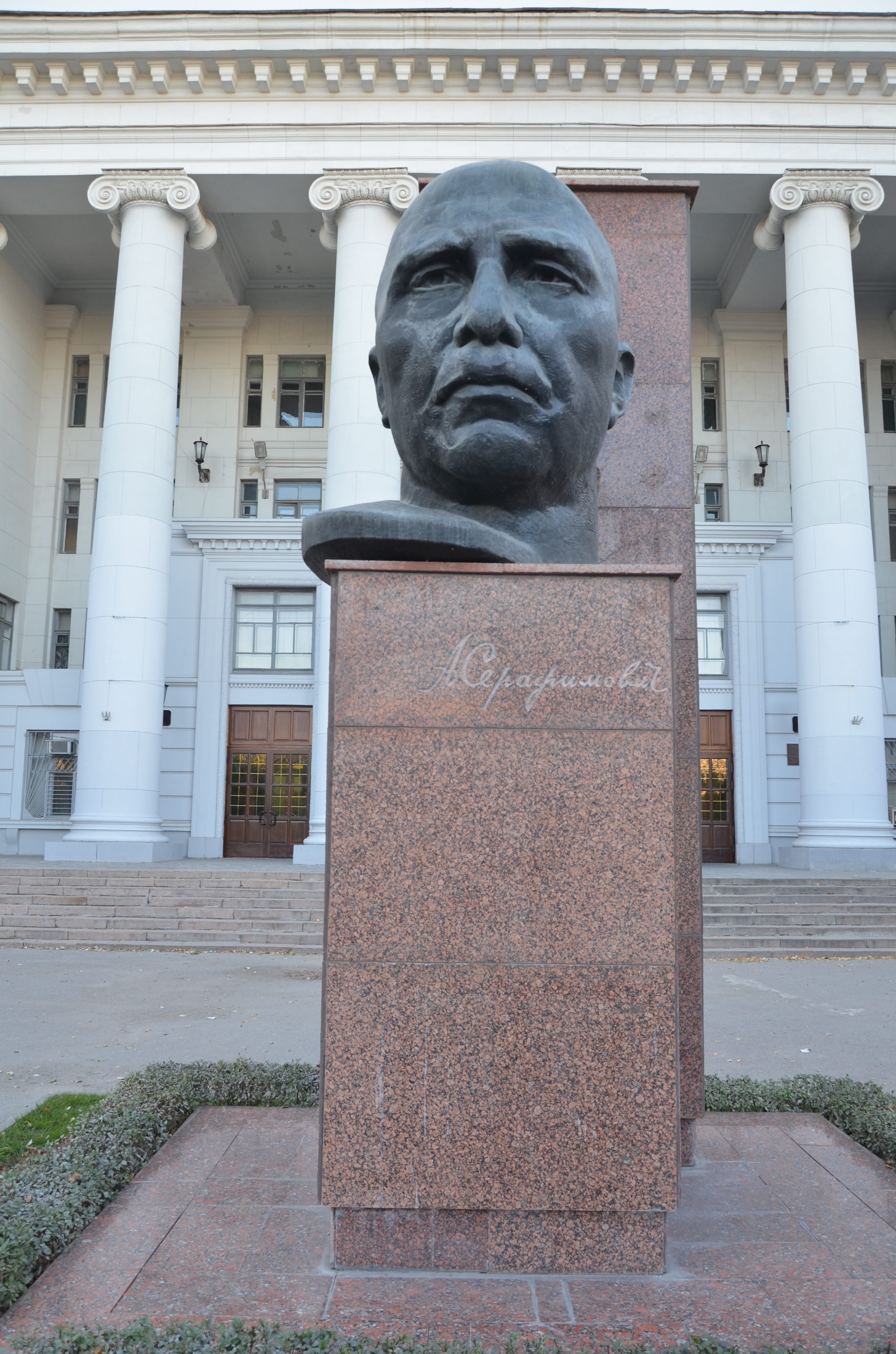 Волгоградский государственный педагогический университет (главный корпус) (Волгоградская область, Волгоград, Ленина пр., 27)